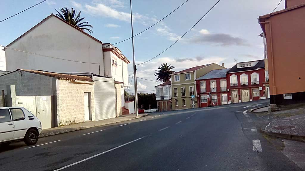 Vista de Serantellos, Ferrol.